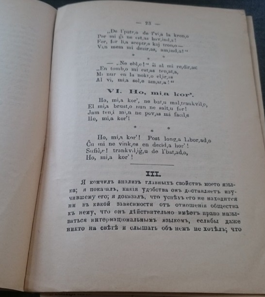 Unua libro per russi - 1887 - pagina 23